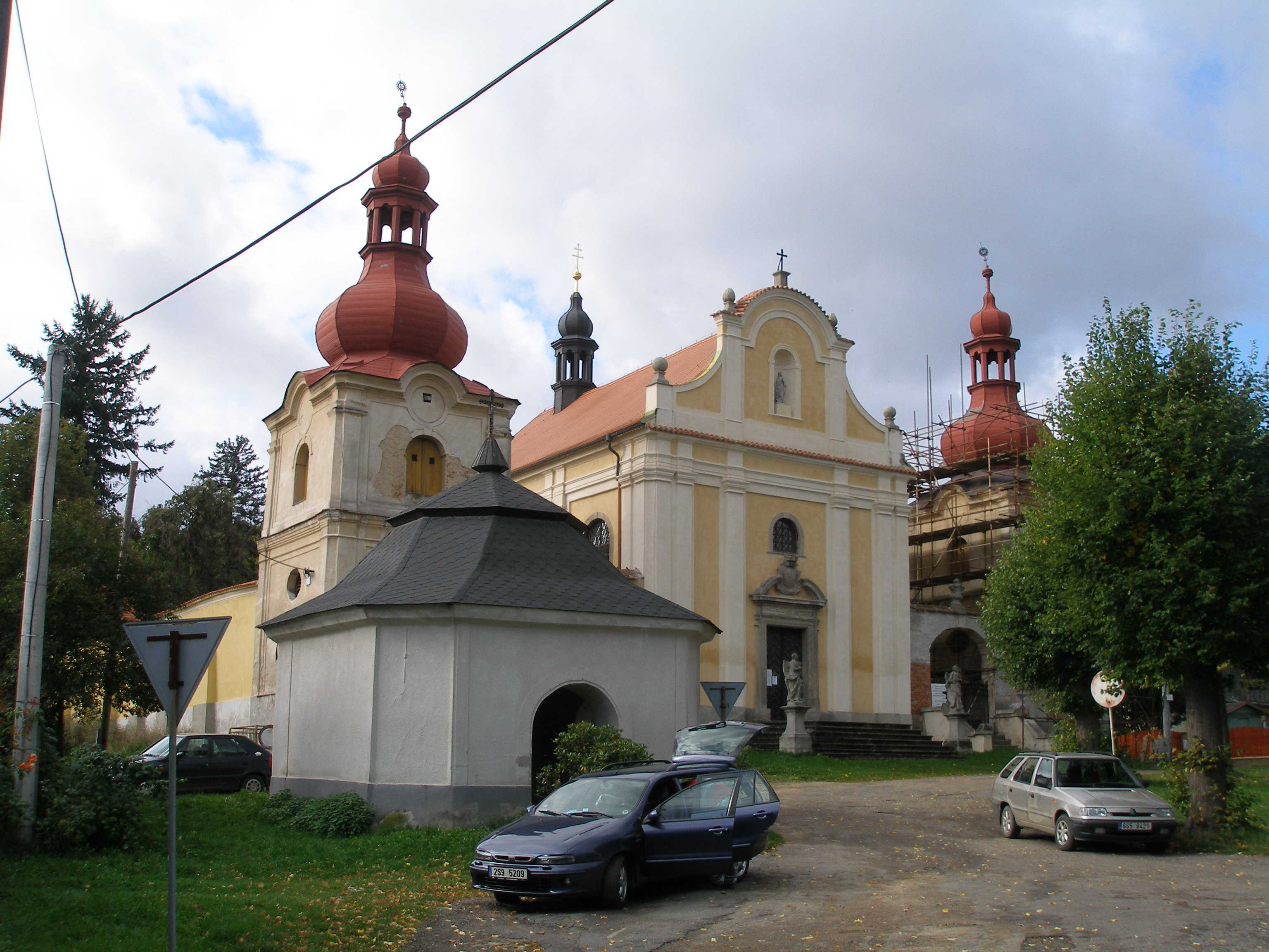 Sudějov - hlavní průčelí kostela svaté Anny, v popředí kaple, do níž je sveden pramen z kostela